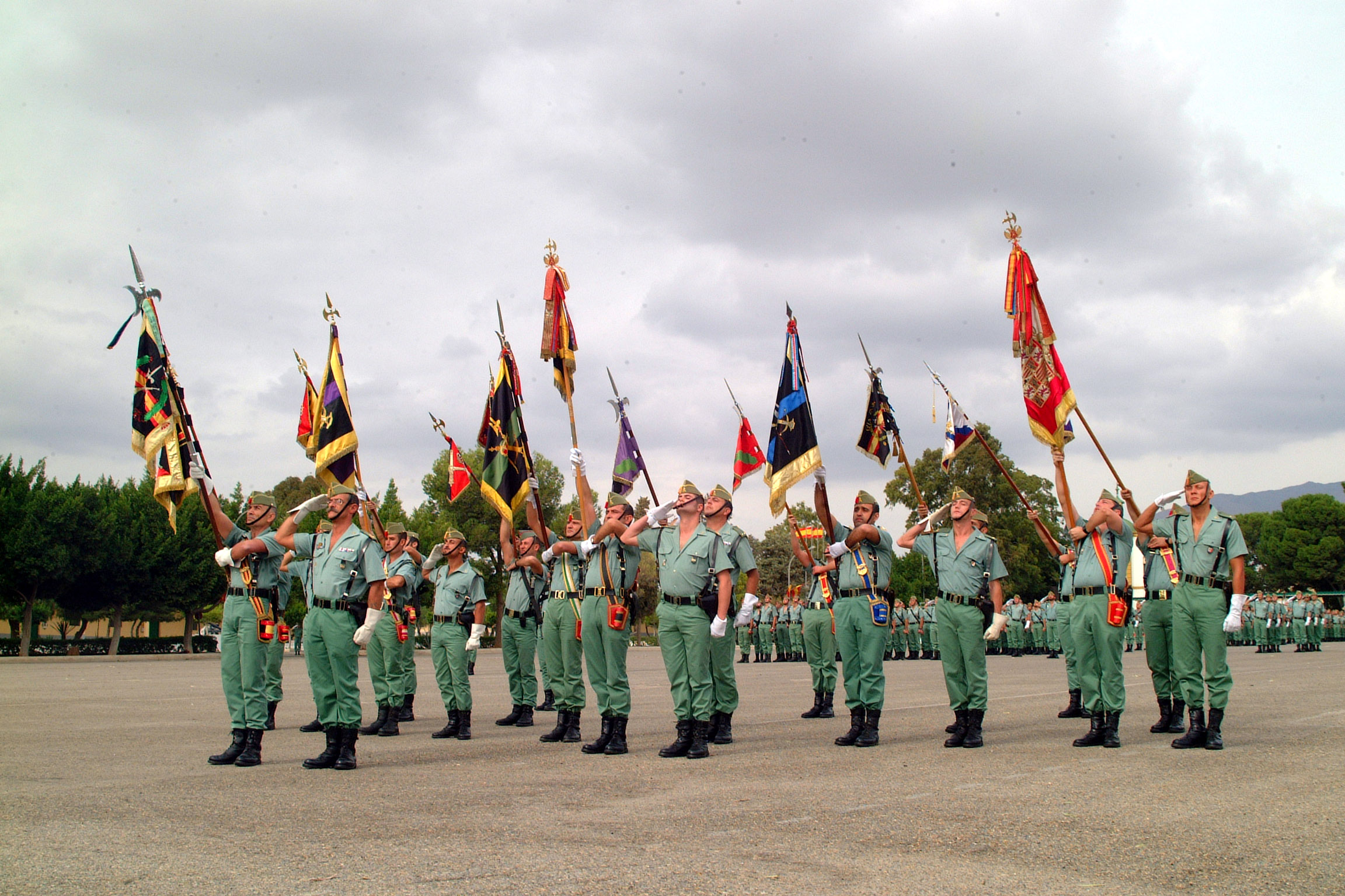 Banderas de la Legion español